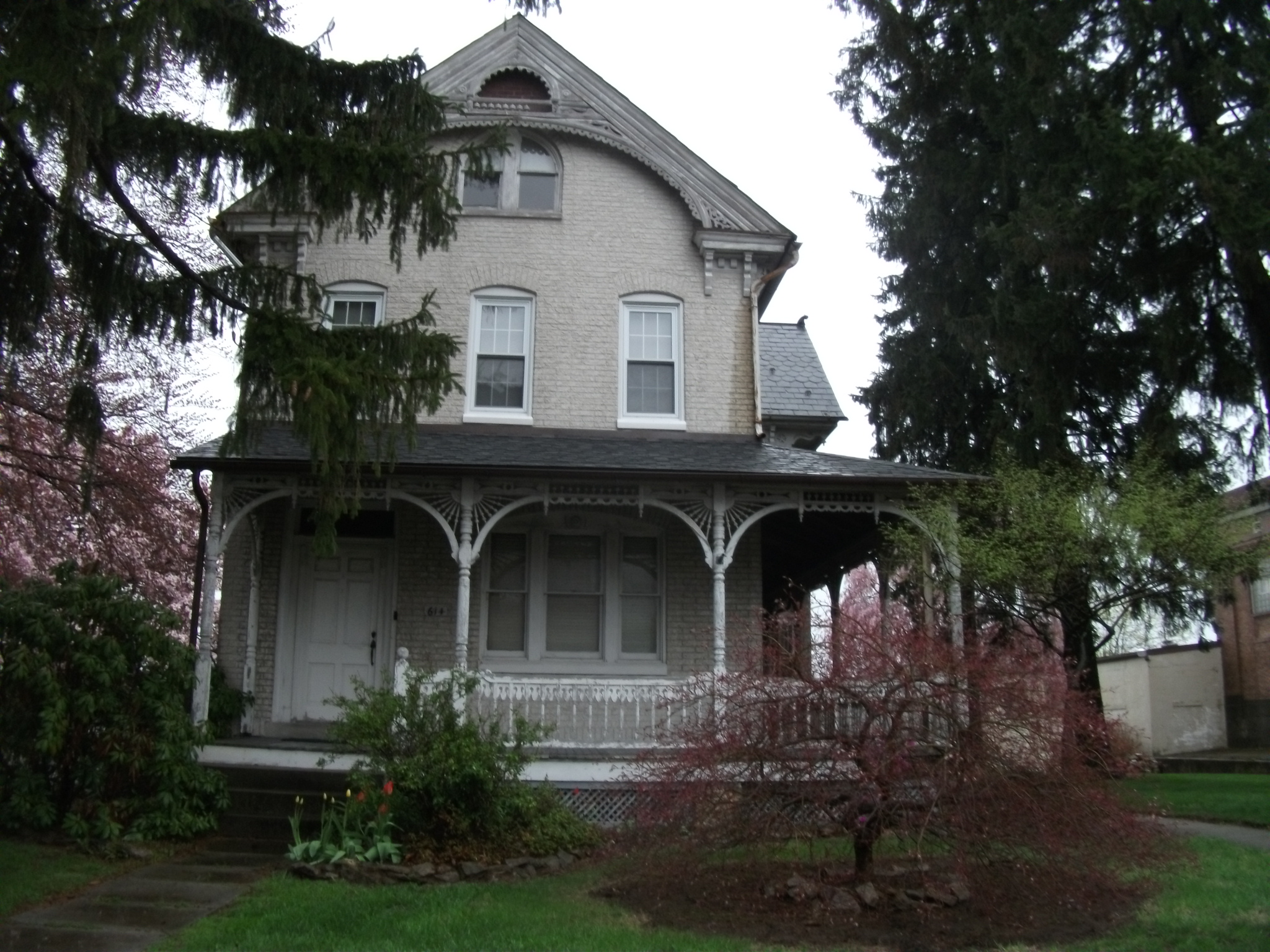 Bally, Pennsylvania